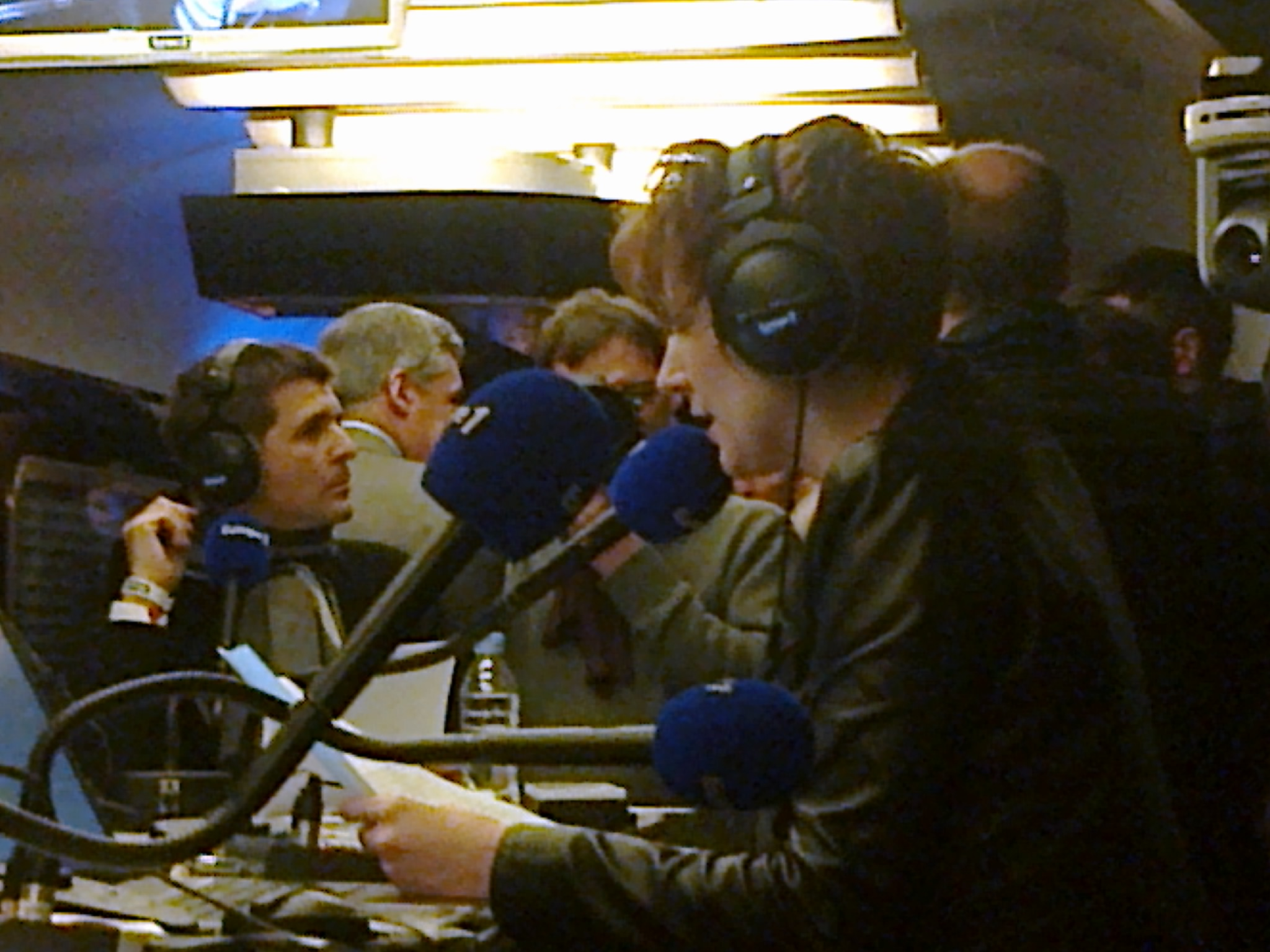 Natacha Polony lors de la matinale d'Europe 1 en Gare de Lyon à Paris le 21 mars 2014